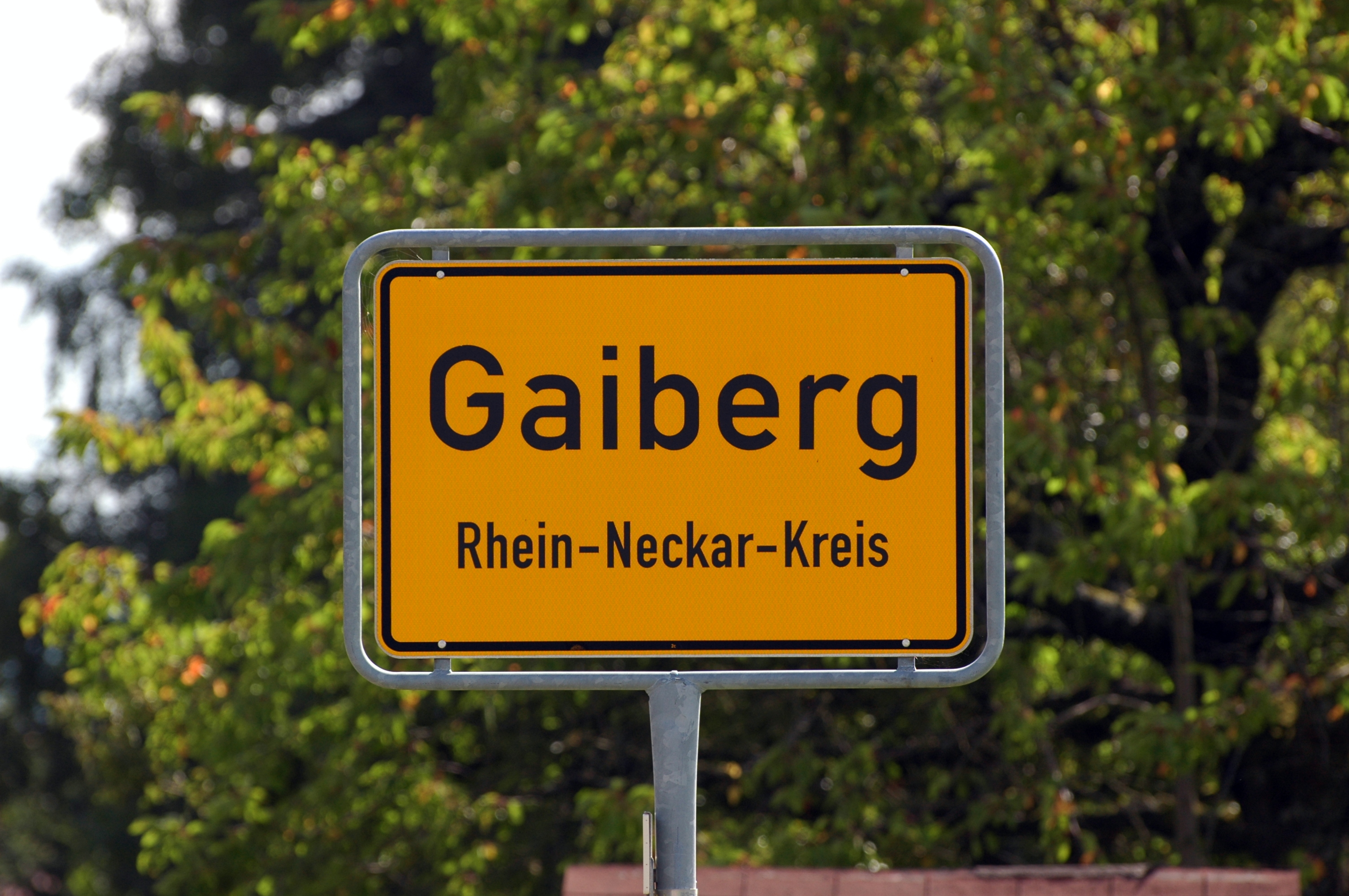 Gaiberg - Umbau